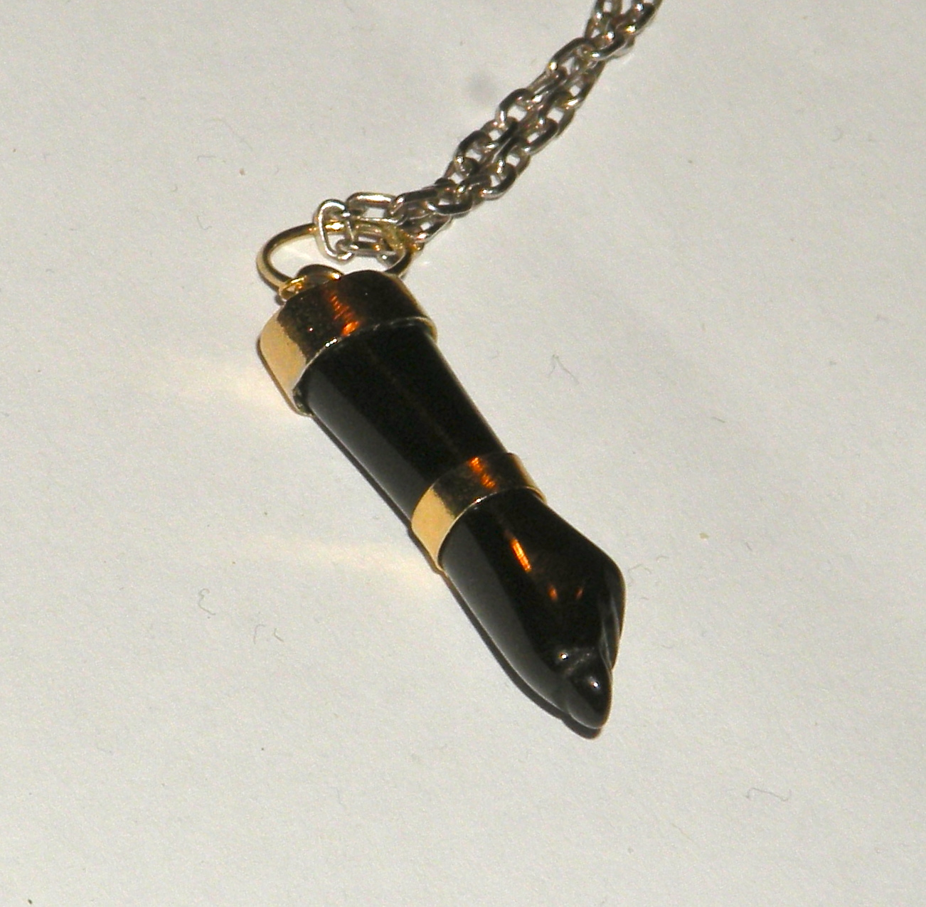 pendentif Figa recto